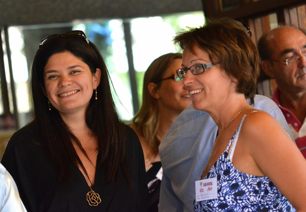 RM 2011 Jour 1. Raquel Garrido